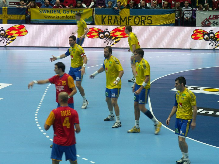 Partido por el bronce entre Suecia y España